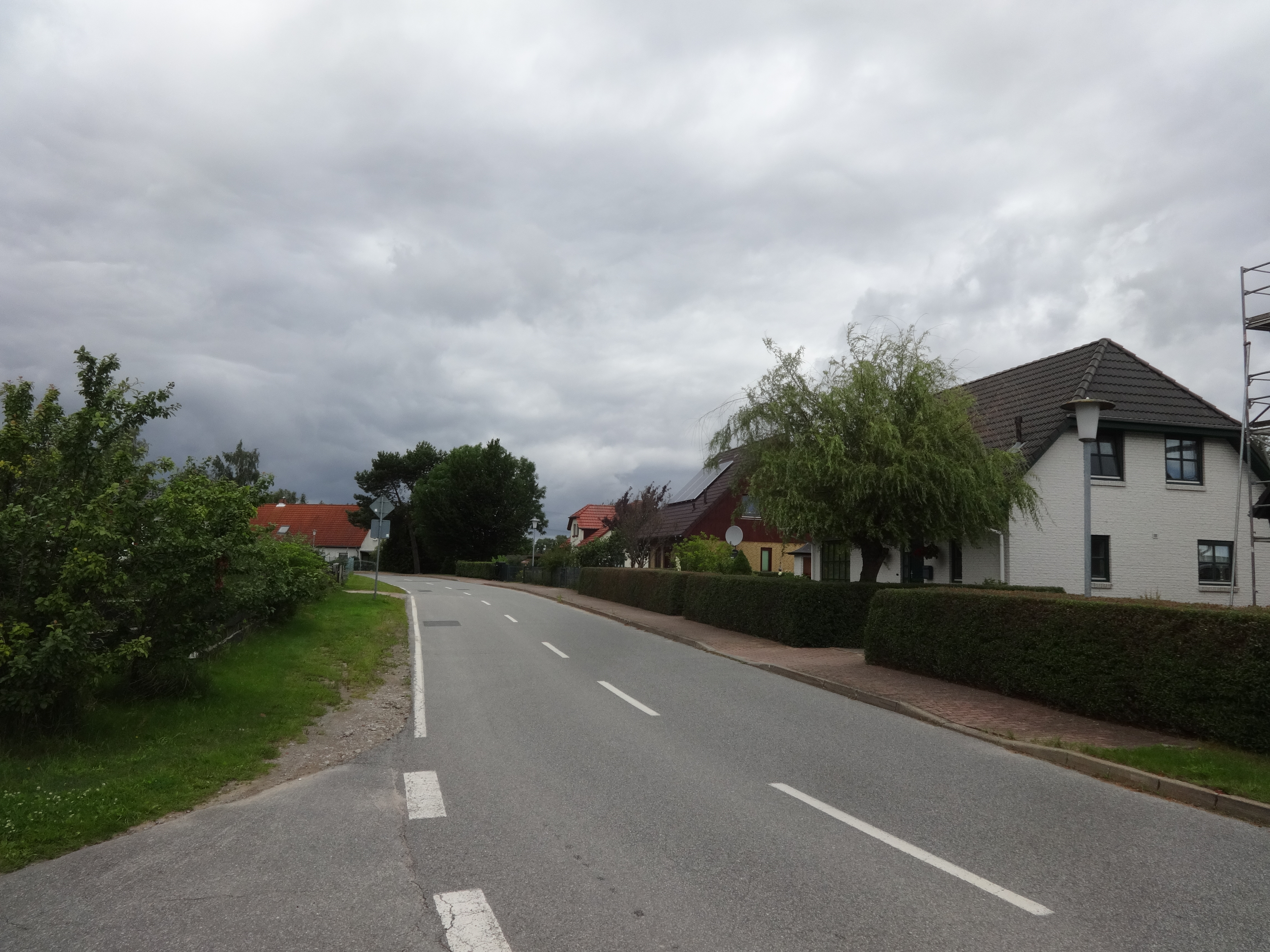 Dorfstraße in Guest, ein Ortsteil der Gemeinde Diedrichshagen im Landkreis Vorpommern-Greifswald in Mecklenburg-Vorpommern